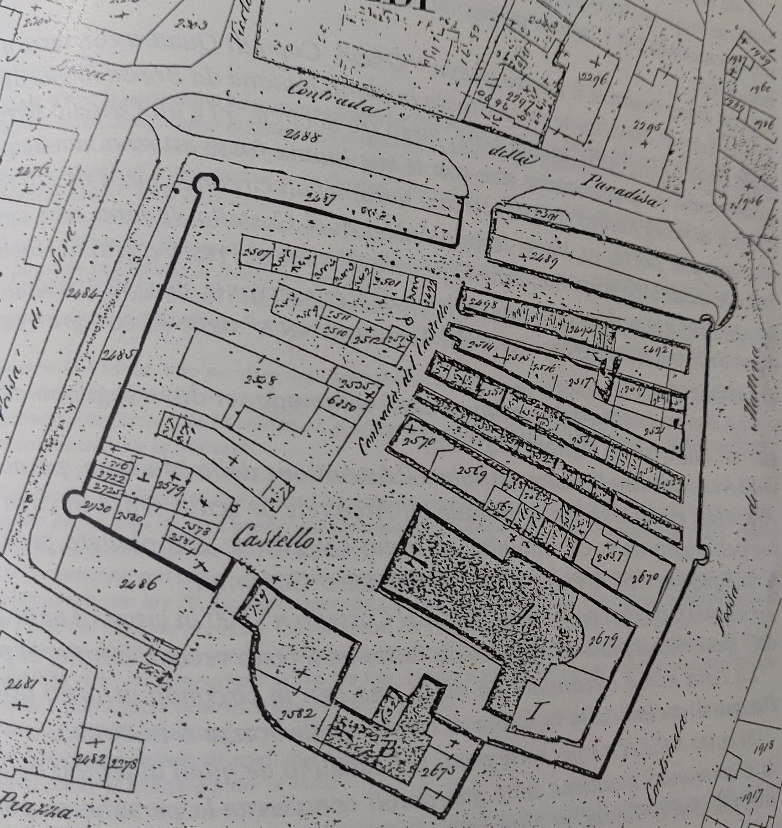 Un dettaglio del catasto Austriaco stilato nel 1852